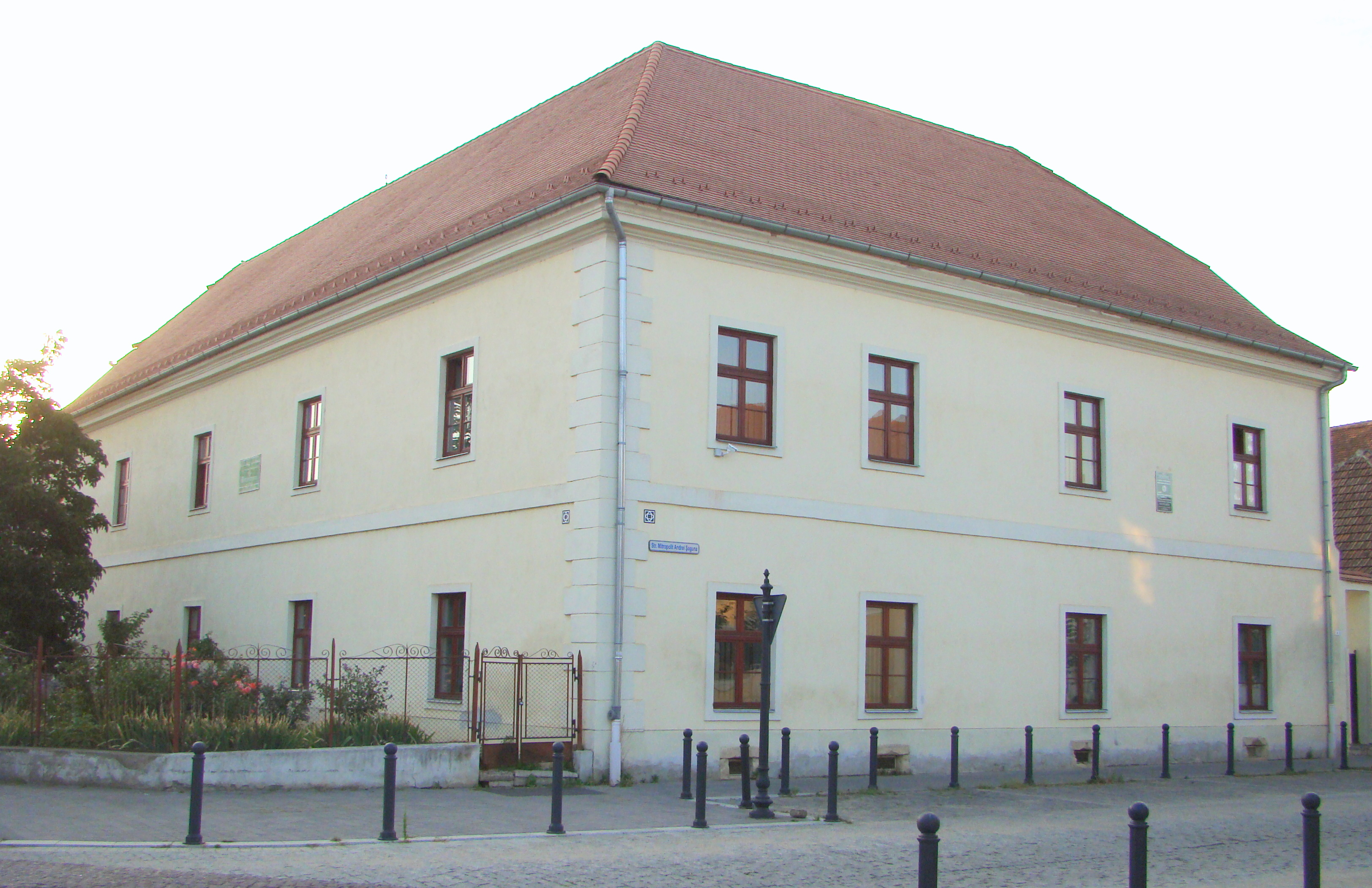 Clădire, fostă „Casa Camerală”, Str. Mitropolit Andrei Șaguna i, municipiul Alba Iulia